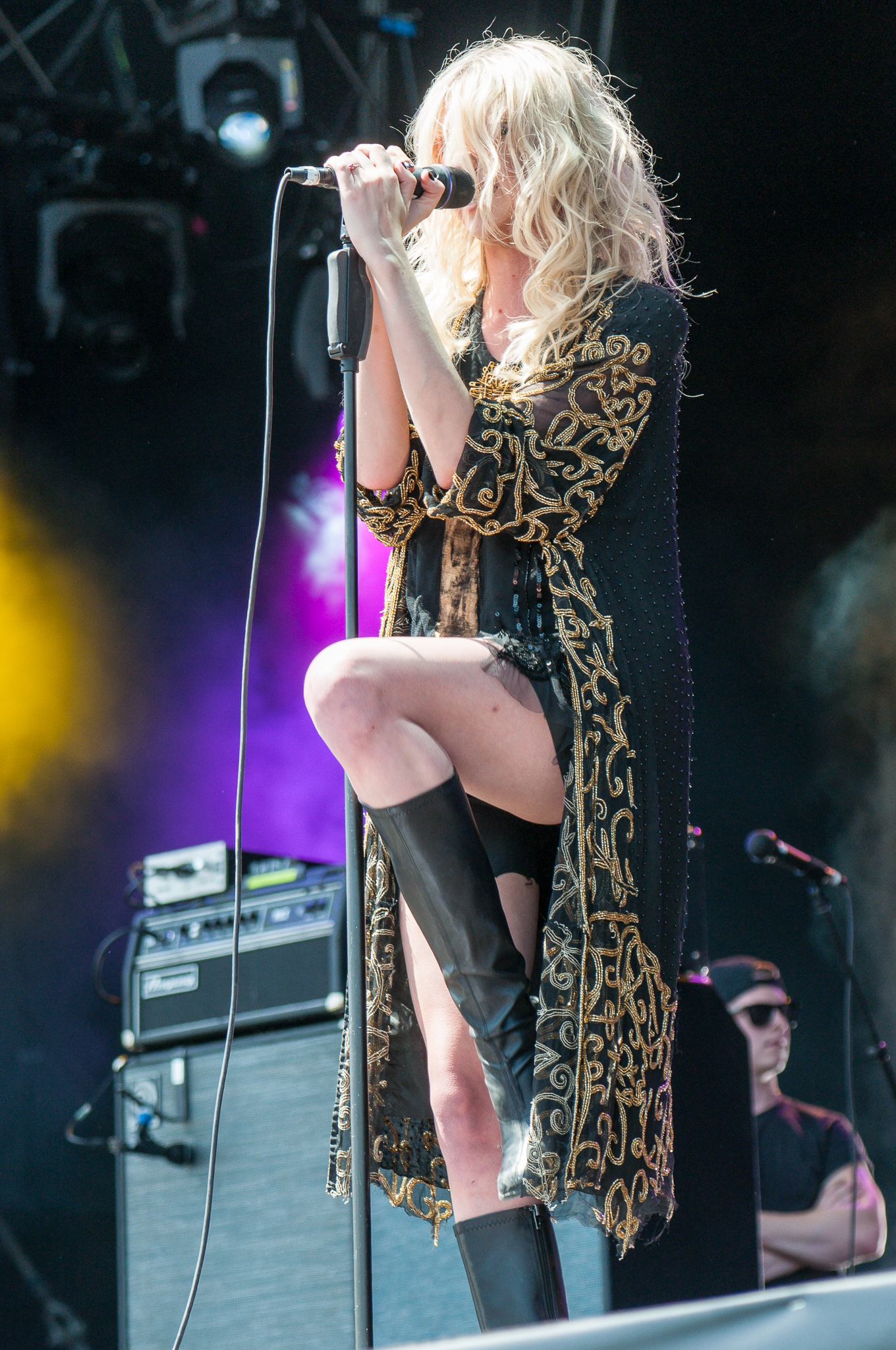 ARGO-Konzerte,Centerstage,Konzert,Livekonzert,Livemusik,Musik,RiP,Rock im Park 2014,Taylor Momsen,The Pretty Reckless